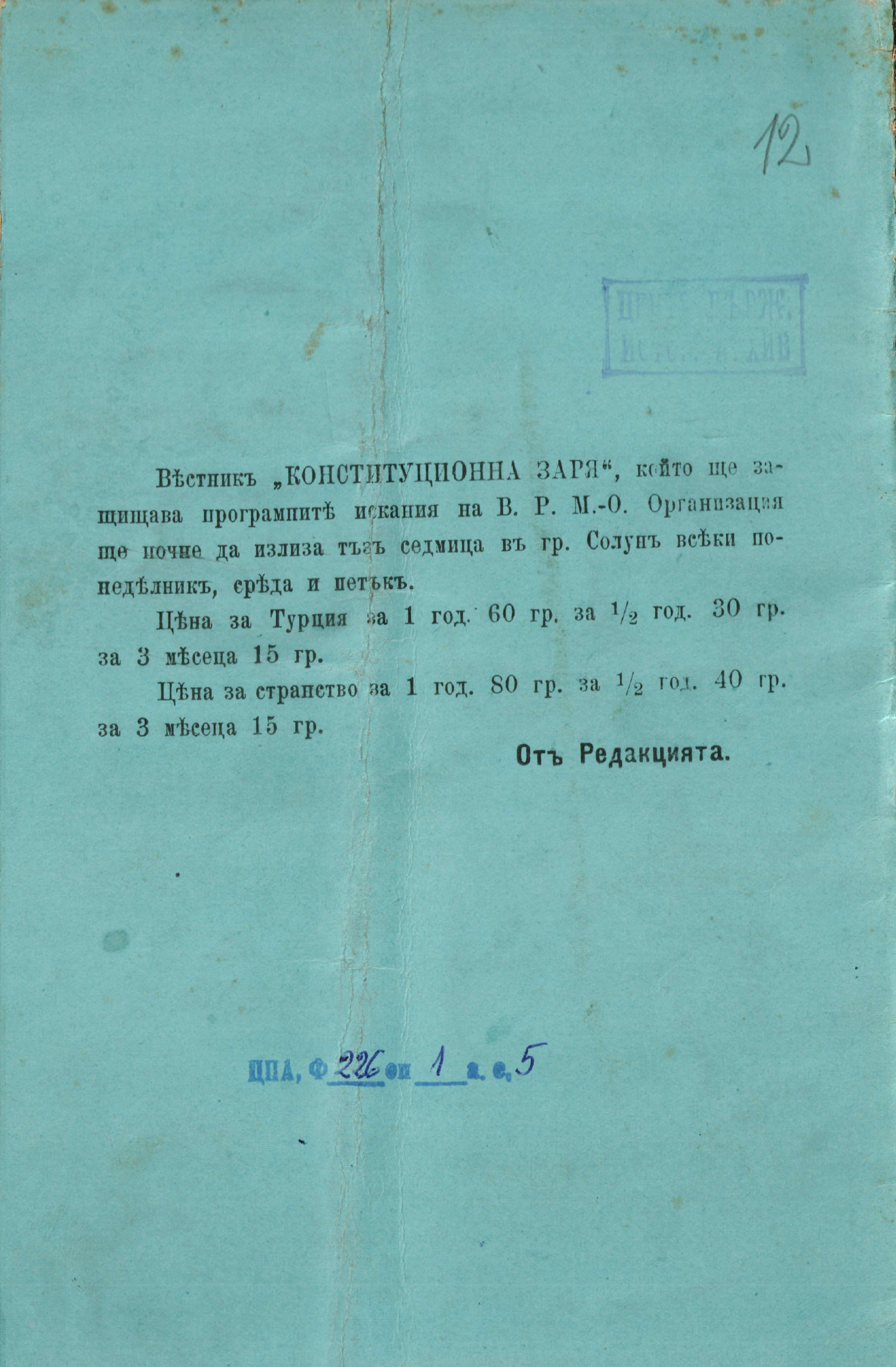 Програмни искания на Македоно-одринската революционна организация, проект изработен от Серския, Солунския и Струмишкия революционен окръг.)